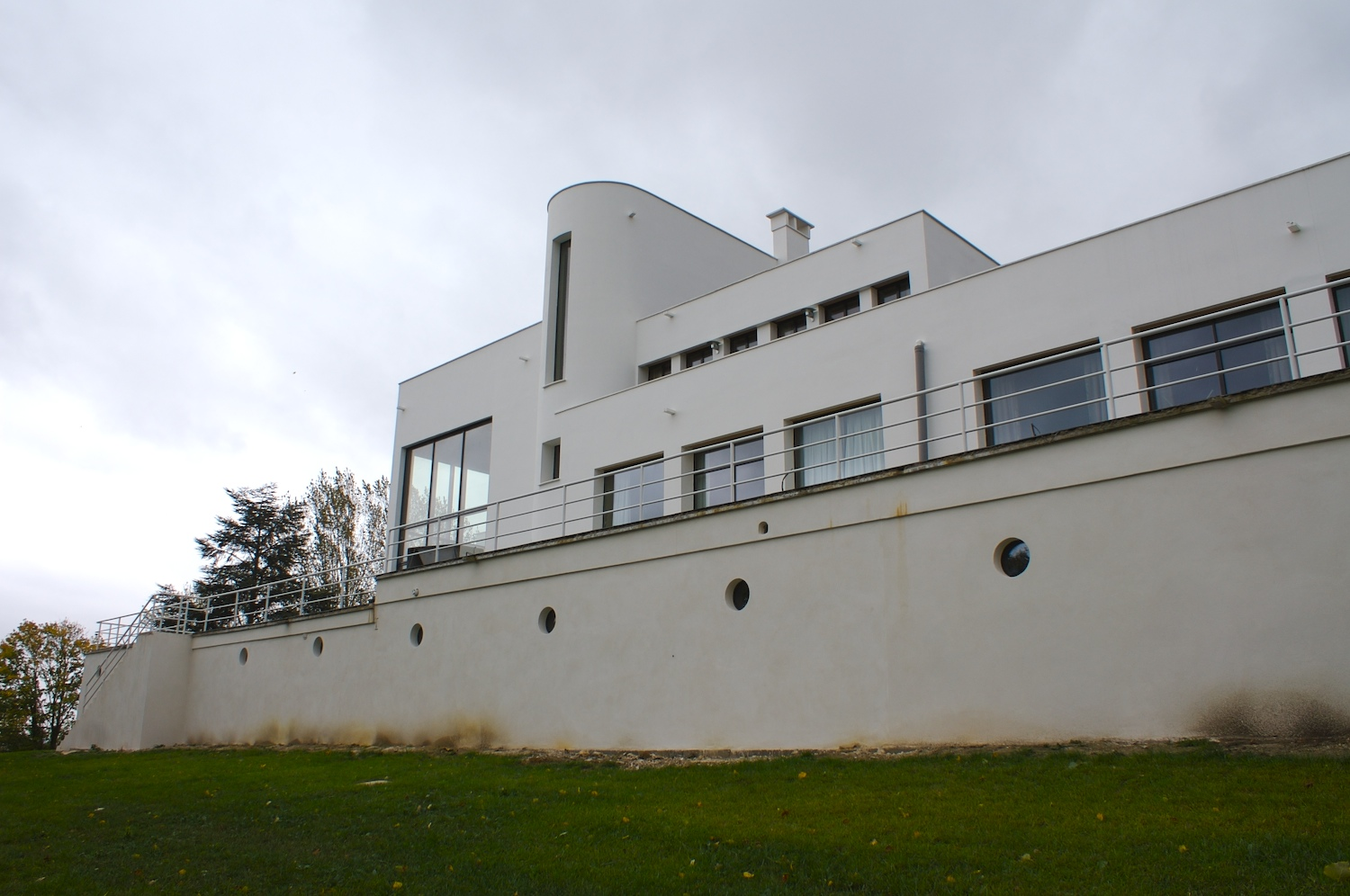 Villa Poiret by Robert Mallet Stevens in Mézy-sur-Seine, France